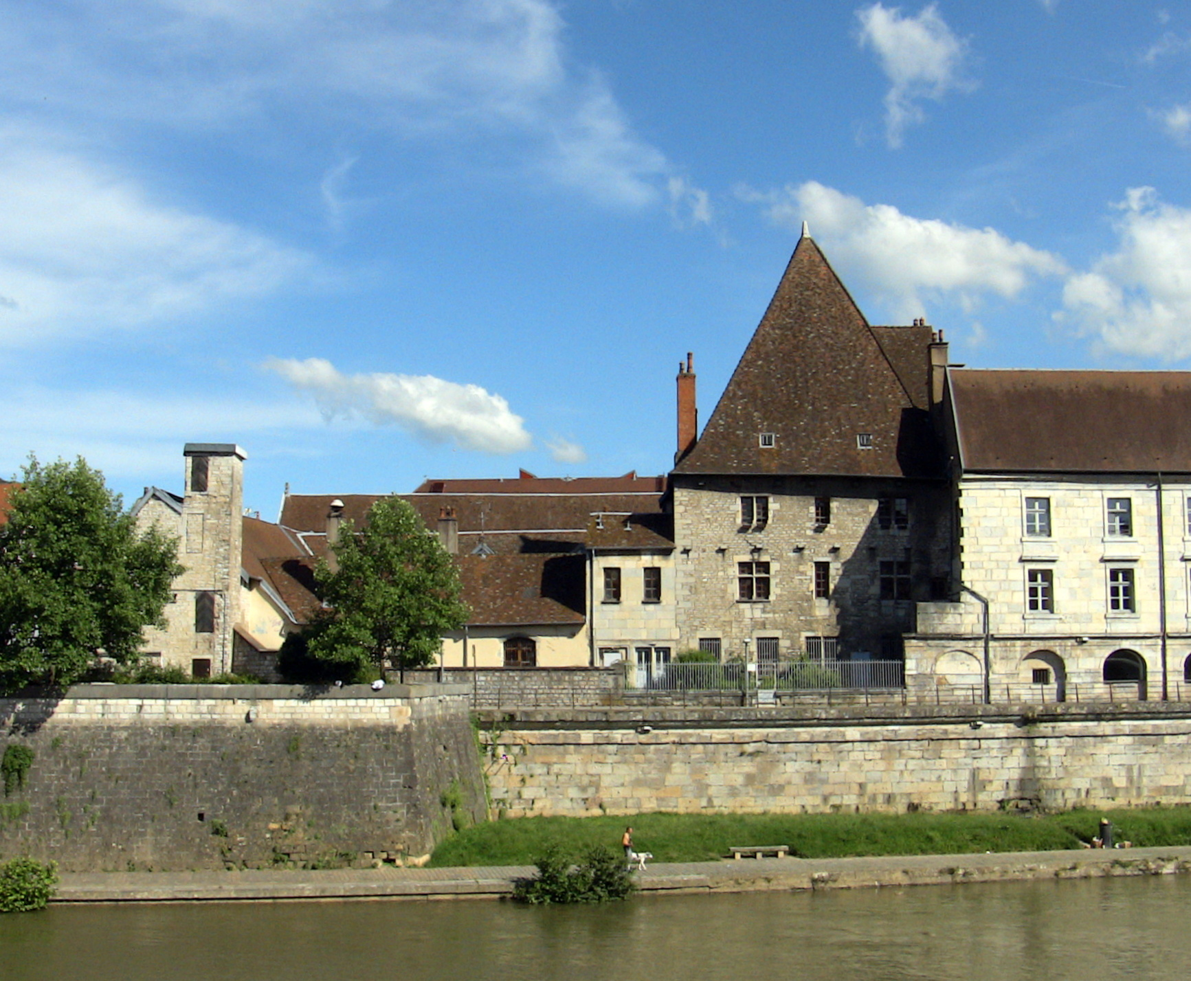 La tour du Saint-Esprit, ensemble protestant de Besançon, depuis le quai de Strasbourg.